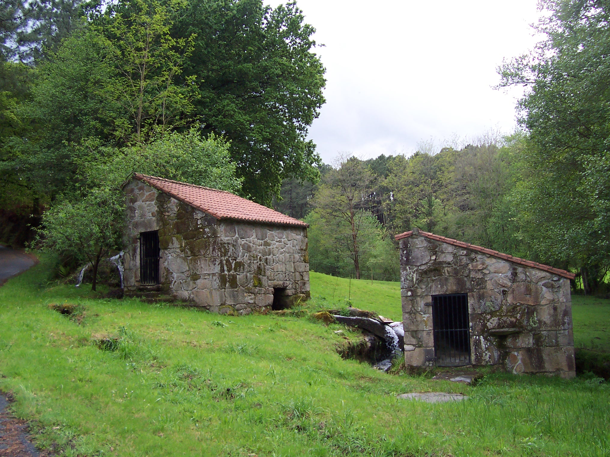 Muiños de Sanín (Brión)